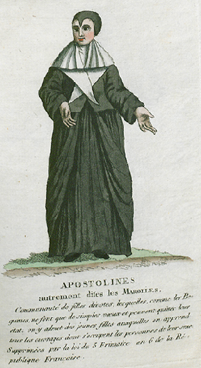 Collection de costumes de tous les ordres monastiques, supprimés à differentes époques, dans la ci-devant Belgique, Bruxelles, Philippe Joseph Maillart et sœur, 1811